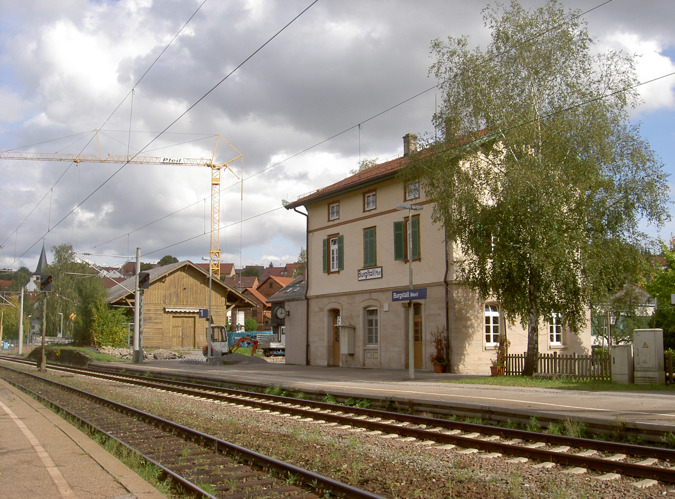 Bahnhof Burgstall (Murr)